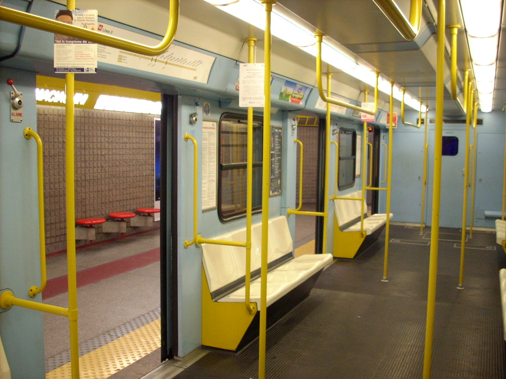 interno carrozza metro gialla (linea 3) milano